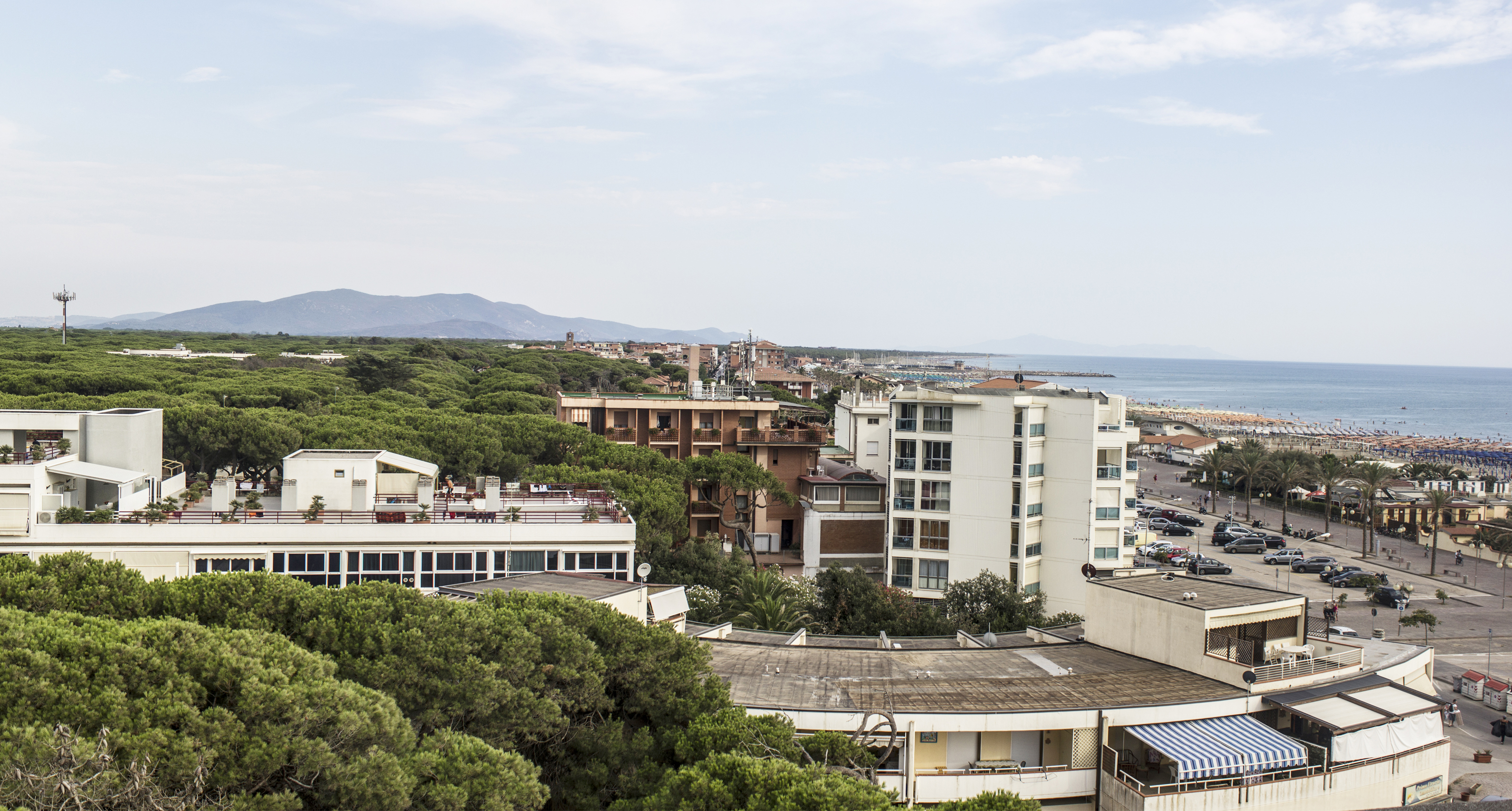 Panorama di Marina di Grosseto da nord. Foto scattata dall'edificio La Tartaruga della lottizzazione Bagnara